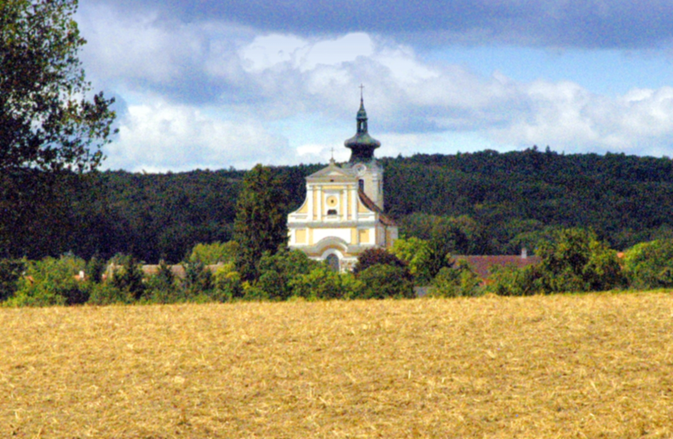 Pfarrkirche Mariae Himmelfahrt in Straning, Bez. Horn von Osten aus gesehen